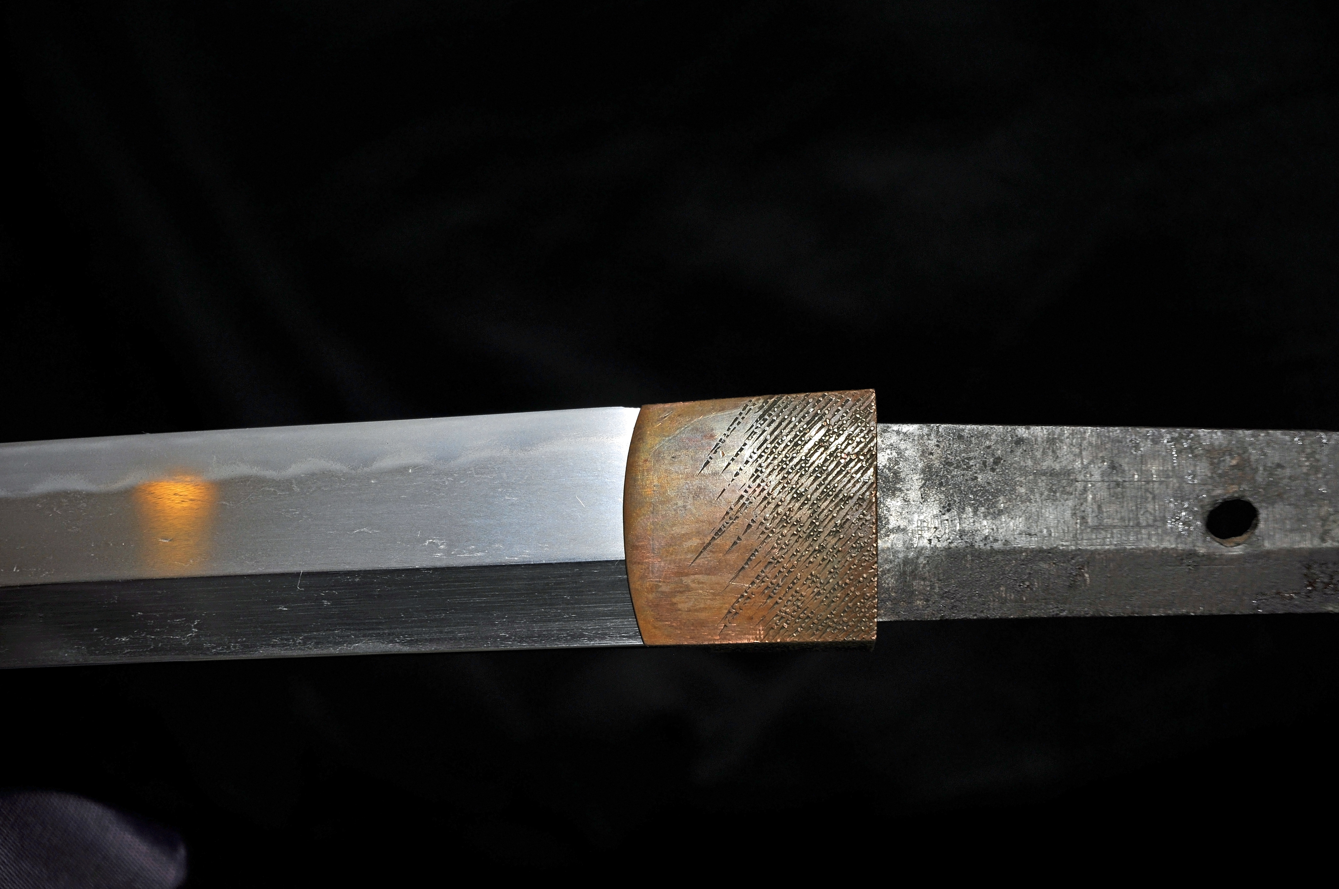 habaki, mekugi-ana